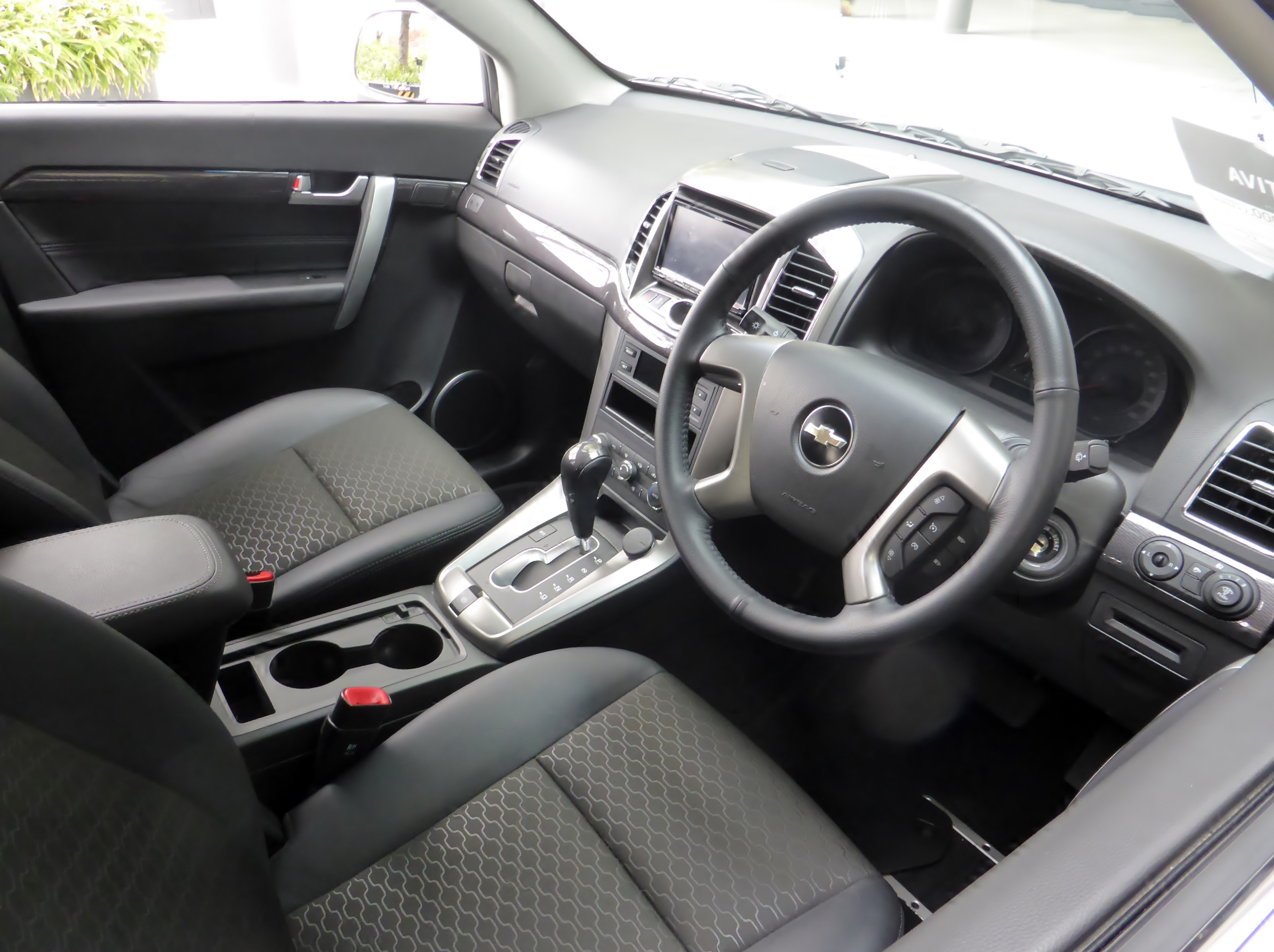 シボレー・キャプティバのインテリアを撮影。